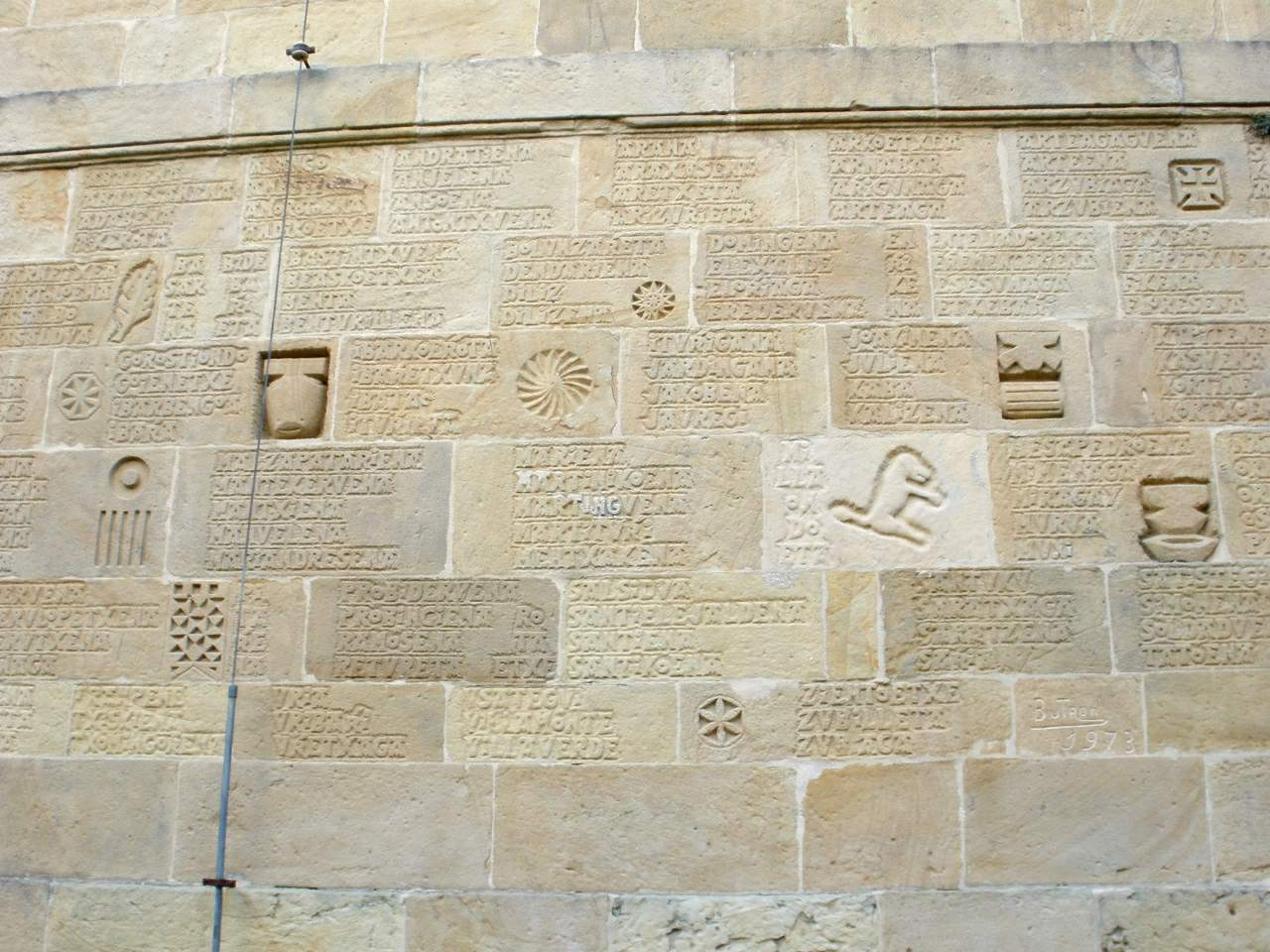 Iglesia de Andra Mari, en Santa María de Getxo (Bizkaia)